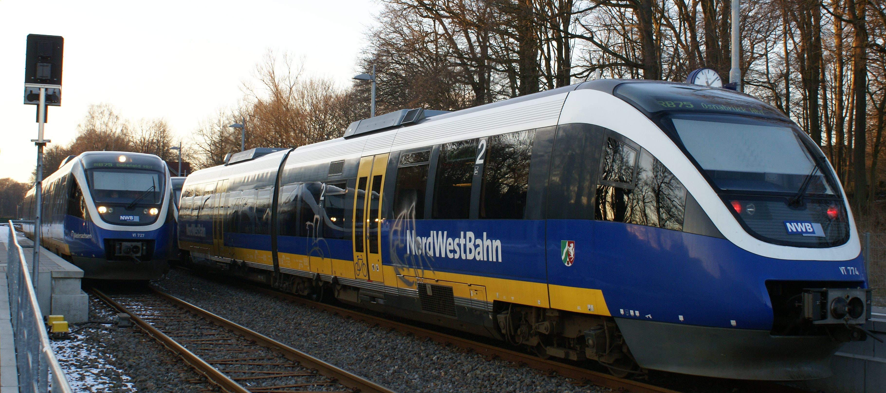 Zwei Haller Willems (Bombardier Talents) der Nordwestbahn im Bahnhof Wellendorf im Februar 2009